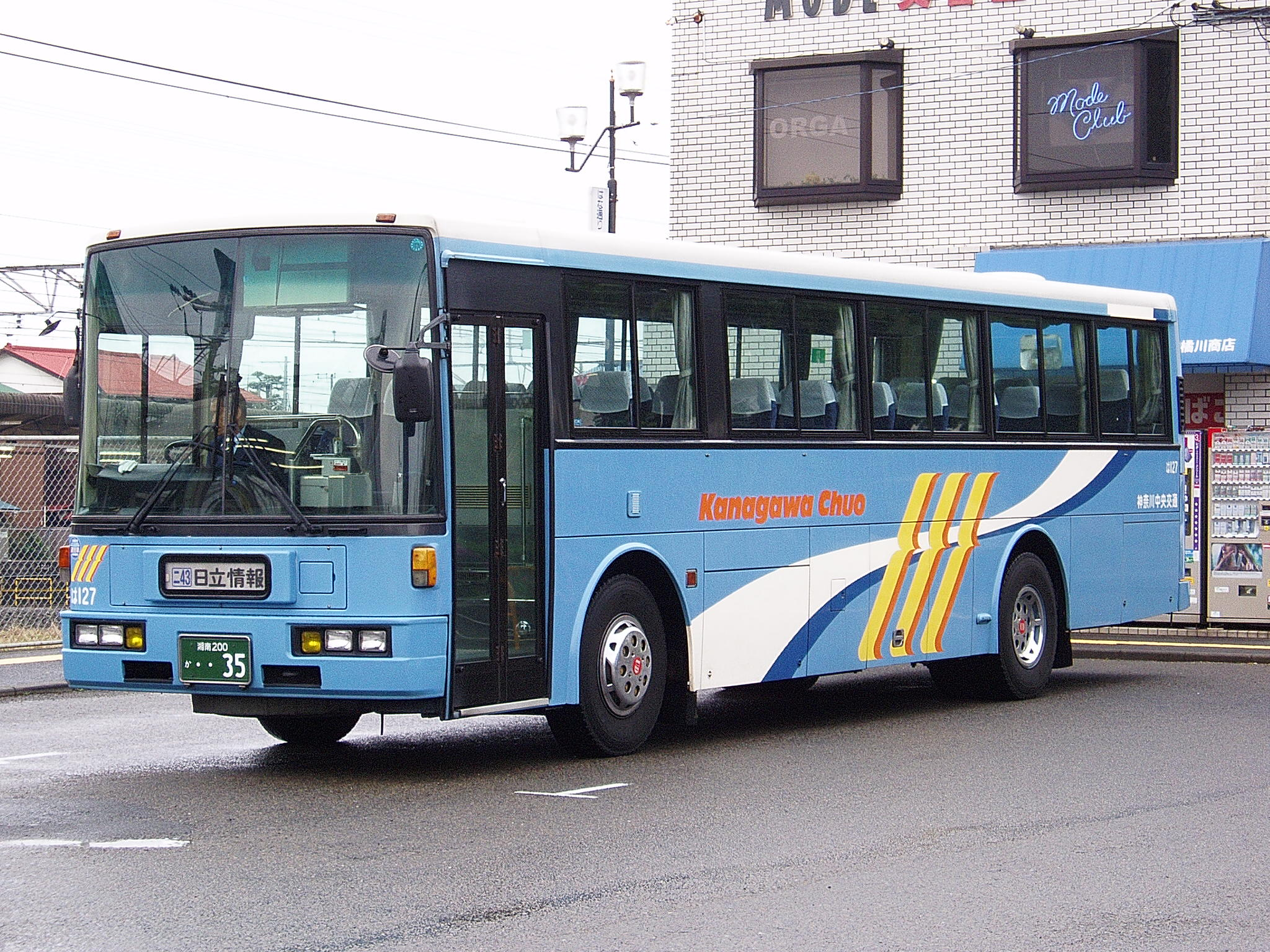 Kanachu Ha127（は127） Nissan Diesel KC-UA521NAN at Ninomiya Sta.